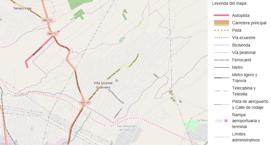 Red vial de San Pablo del Monte (Villa Vicente Guerrero)